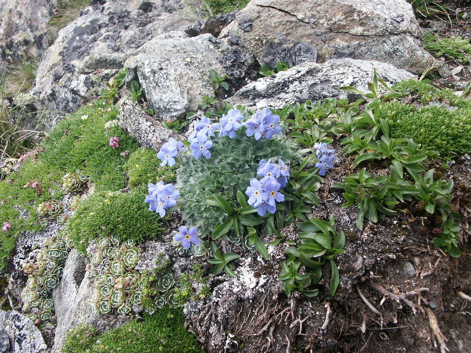 Eritrichium_nanum, Klafferschneide, Schladminger Tauern, Styria, Austria